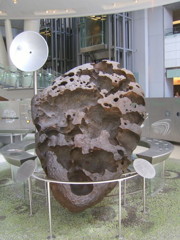 Willamette meteorite